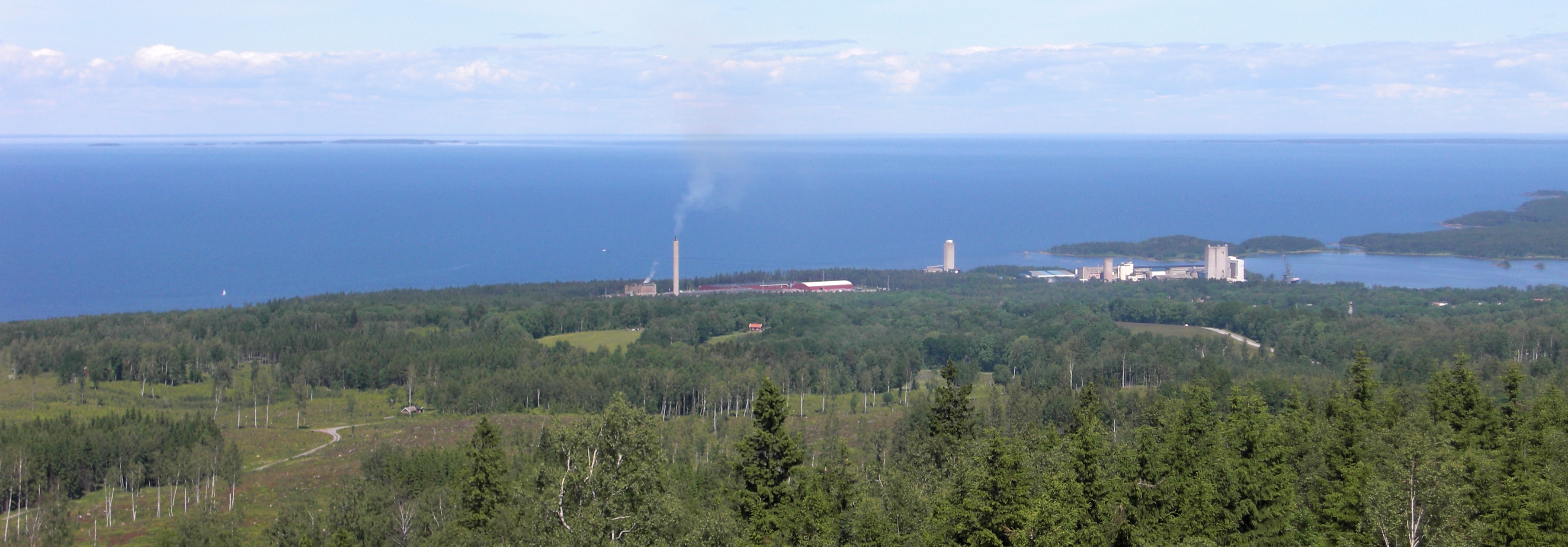 Hällekis industrier sedda från utsiktstornet på Kinnekulle. Industrierna ligger i Österplana socken, Kinne härad, Götene kommun, f.d. Skaraborgs län, Västergötland, Västra Götalands län, Sverige.